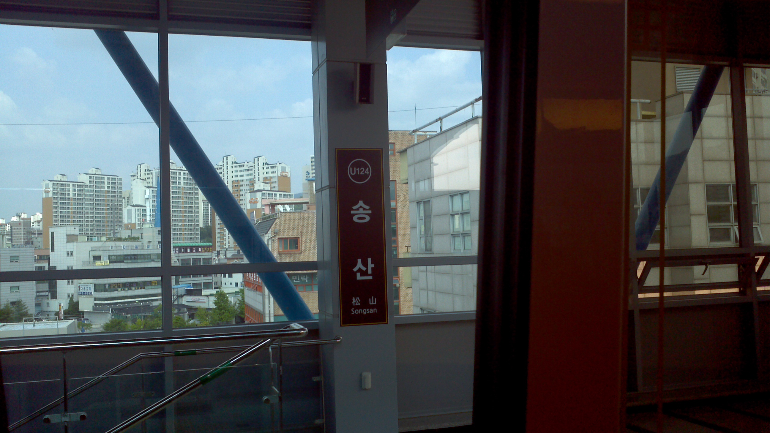 송산역 역명판